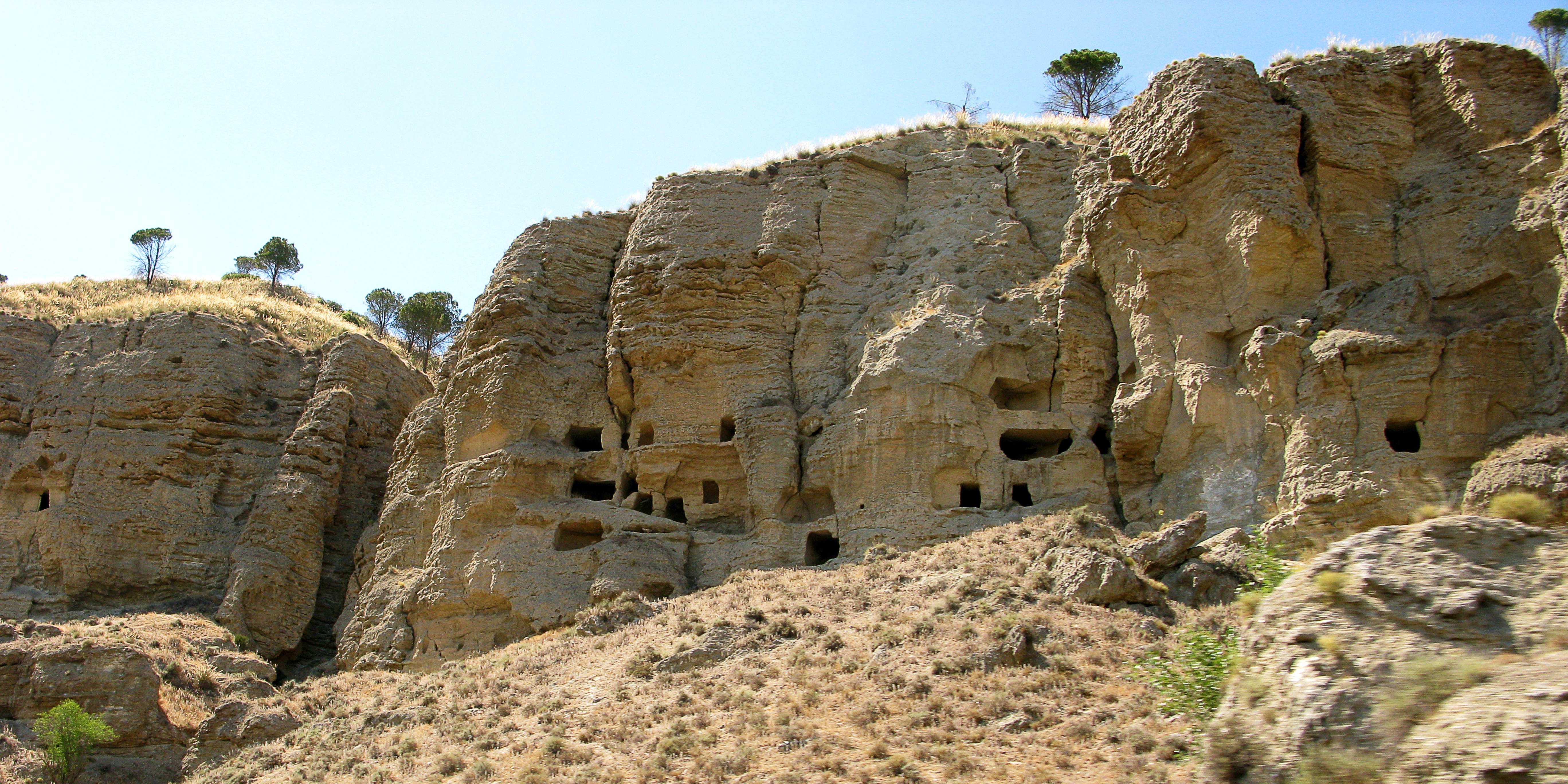 En Madrid por la carretera M-204 en dirección a Tielmes se encuentra el llamado Risco de las Cuevas de origen prehistórico, llamado de "los Dolomitas" mineral parecido a la calcita" transparente o traslúcido y formado por carbonato cálcico y magnésico o lo que es lo mismo yeso Se cree que fueron excavadas en el Neolítico como habitáculo, aunque en el entorno se han hallado numerosos restos arqueológicos de distintas culturas Algunas de estas cuevas estaban en comunicación Se catalogaron un total de 50, su exploración empezó hacia 1891 El paso del tiempo han ido produciendo diversos desprendimientos por las grietas llamadas diaclasas, que en inviernos con años de mucho hielo, hacen de cuña en las mismas, como consecuencia de helarse el agua de lluvia, o del mismo roció. A día de hoy, puede que no lleguen a 30 las cuevas existentes, con perdida de gran parte de su superficie en muchas de ellas. Fueron declaradas de interés turístico nacional en tiempos de la Republica. Pero en la actualidad están abandonadas y mal conservadas.